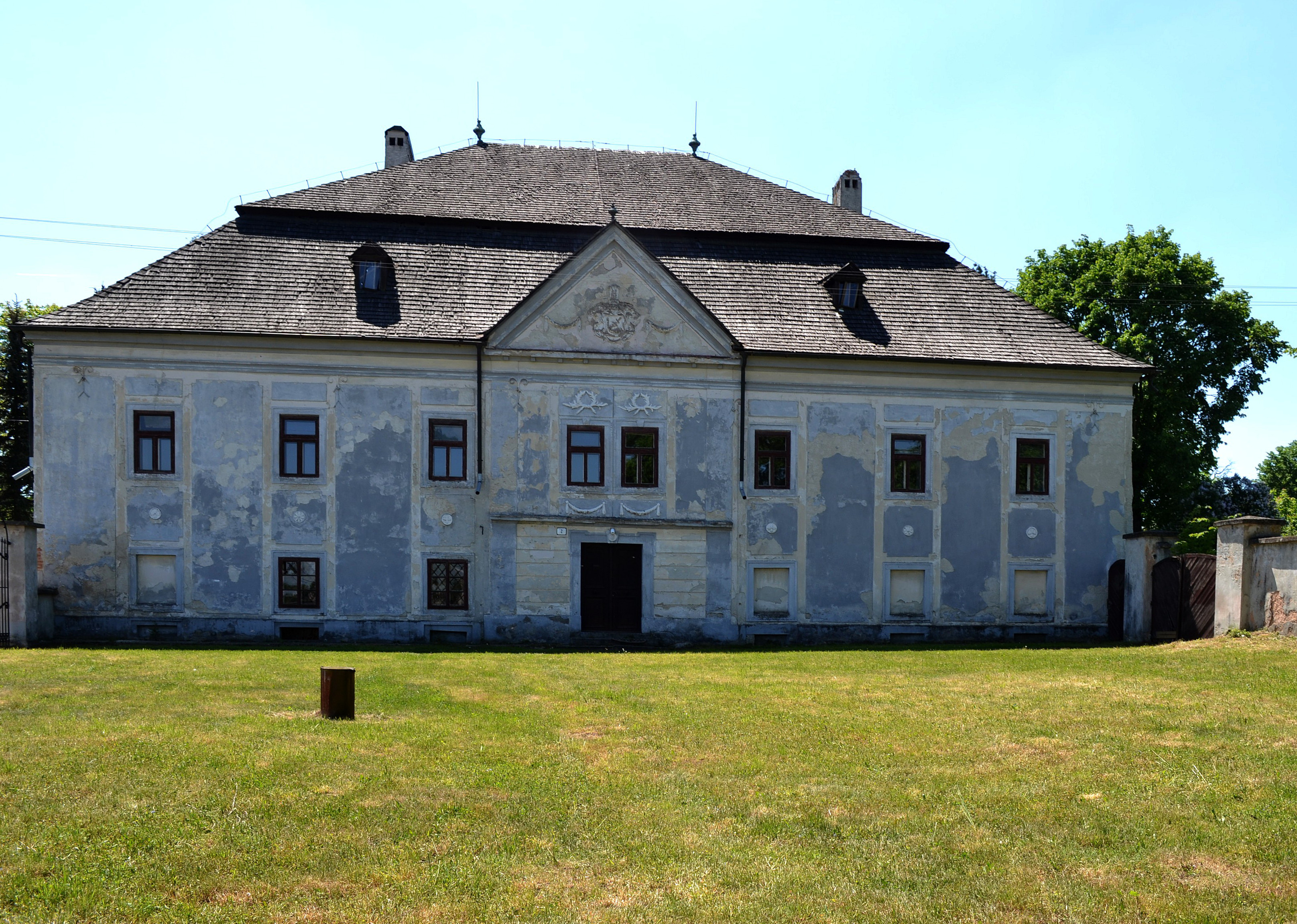 Renesančno-barokový kaštieľ v Ostrej Lúka (okr. Žiar nad Hronom). Pohľad na severné priečelie, majúce barokový vzhľad